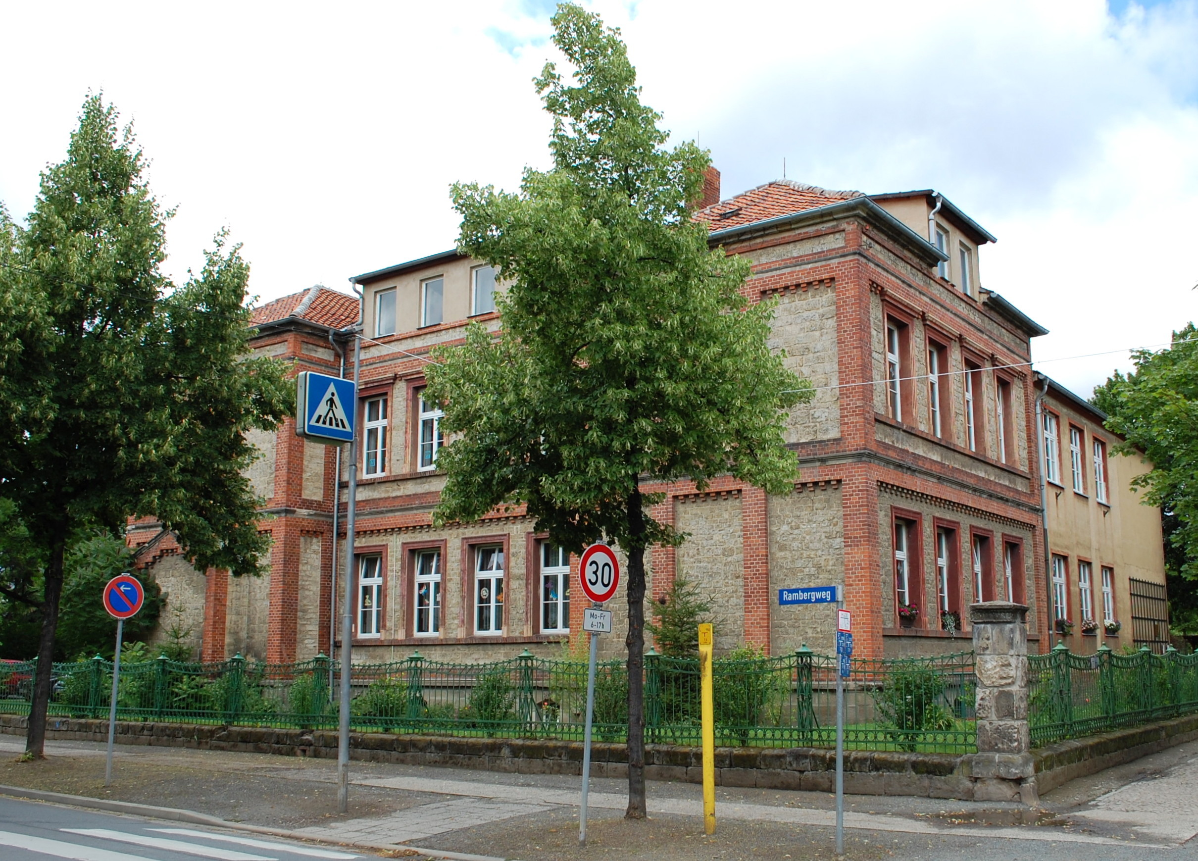 Schule in der Albert-Schweitzer-Straße (Ecke Rambergweg) in Quedlinburg